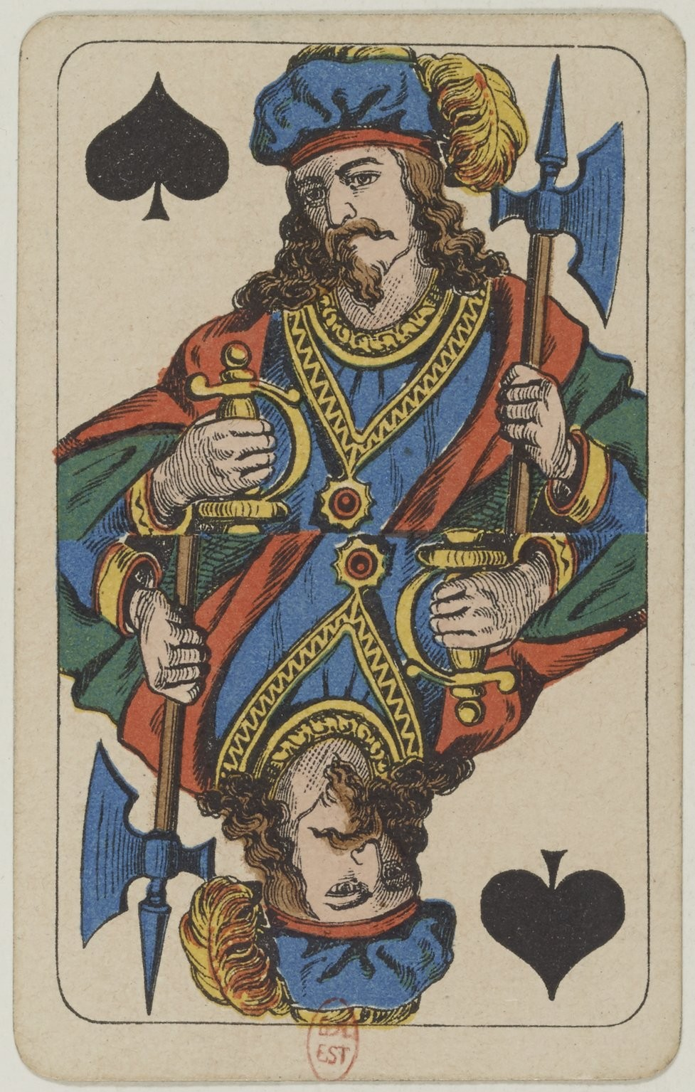 Walet Pik z Wzoru Berlińskiego